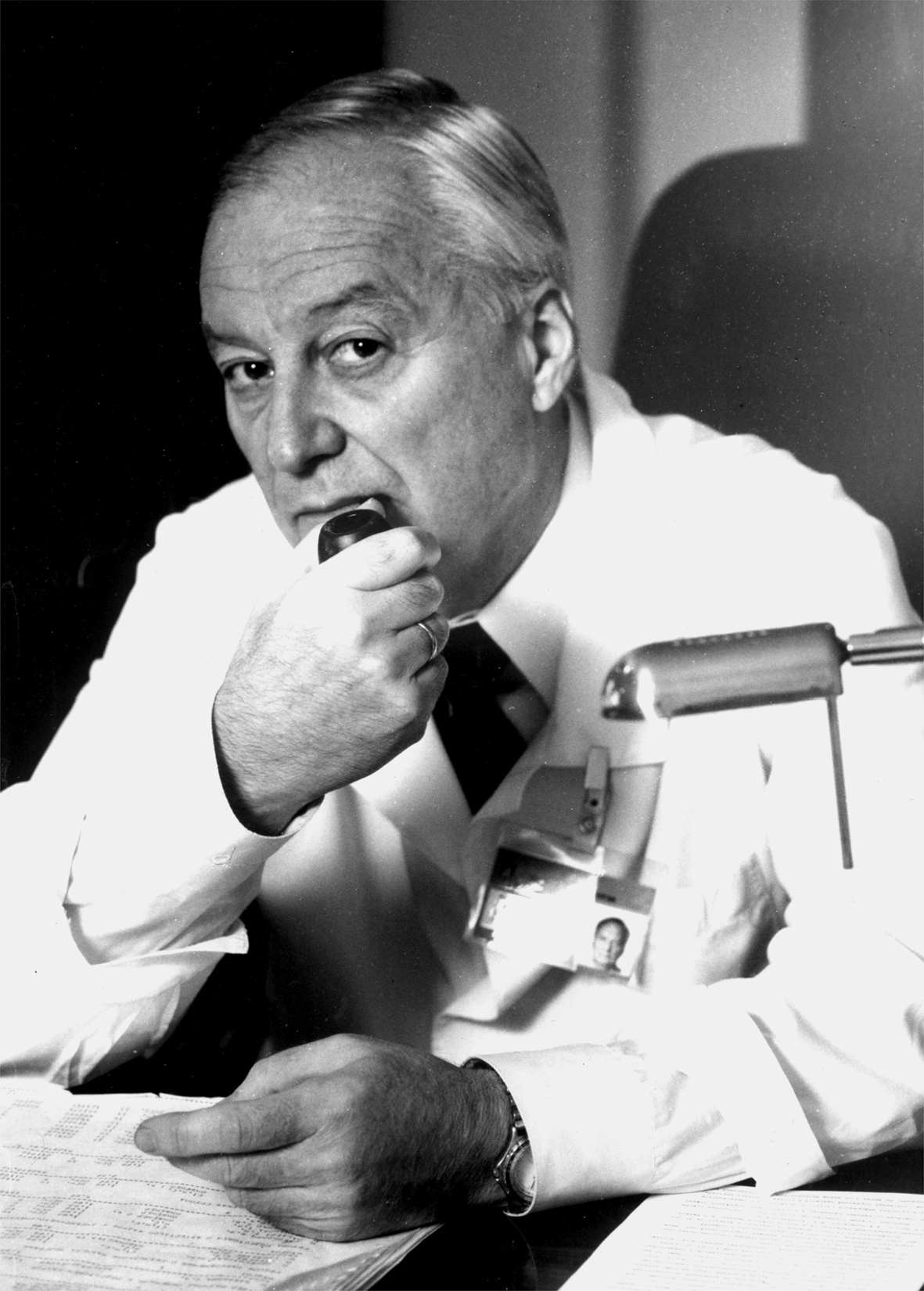 Борис Алексеевич Константинов (27.08.1934—30.07.2012) — доктор медицинских наук, профессор, академик РАМН, директор РНЦХ РАМН в 1988—2009 годах.